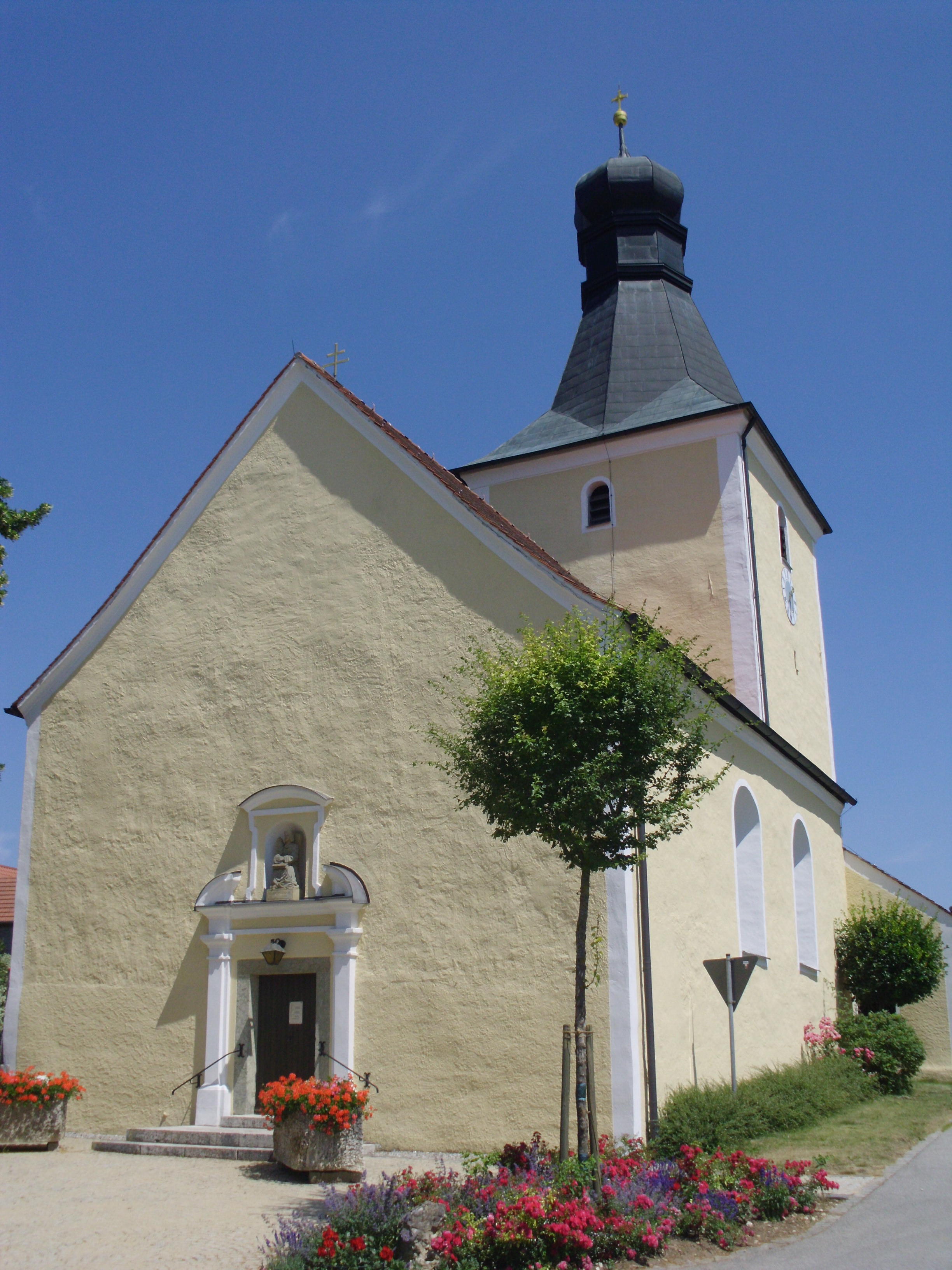 Langenthonhausen, Ortsteil von Breitenbrunn im Landkreis Neumarkt in der Oberpfalz